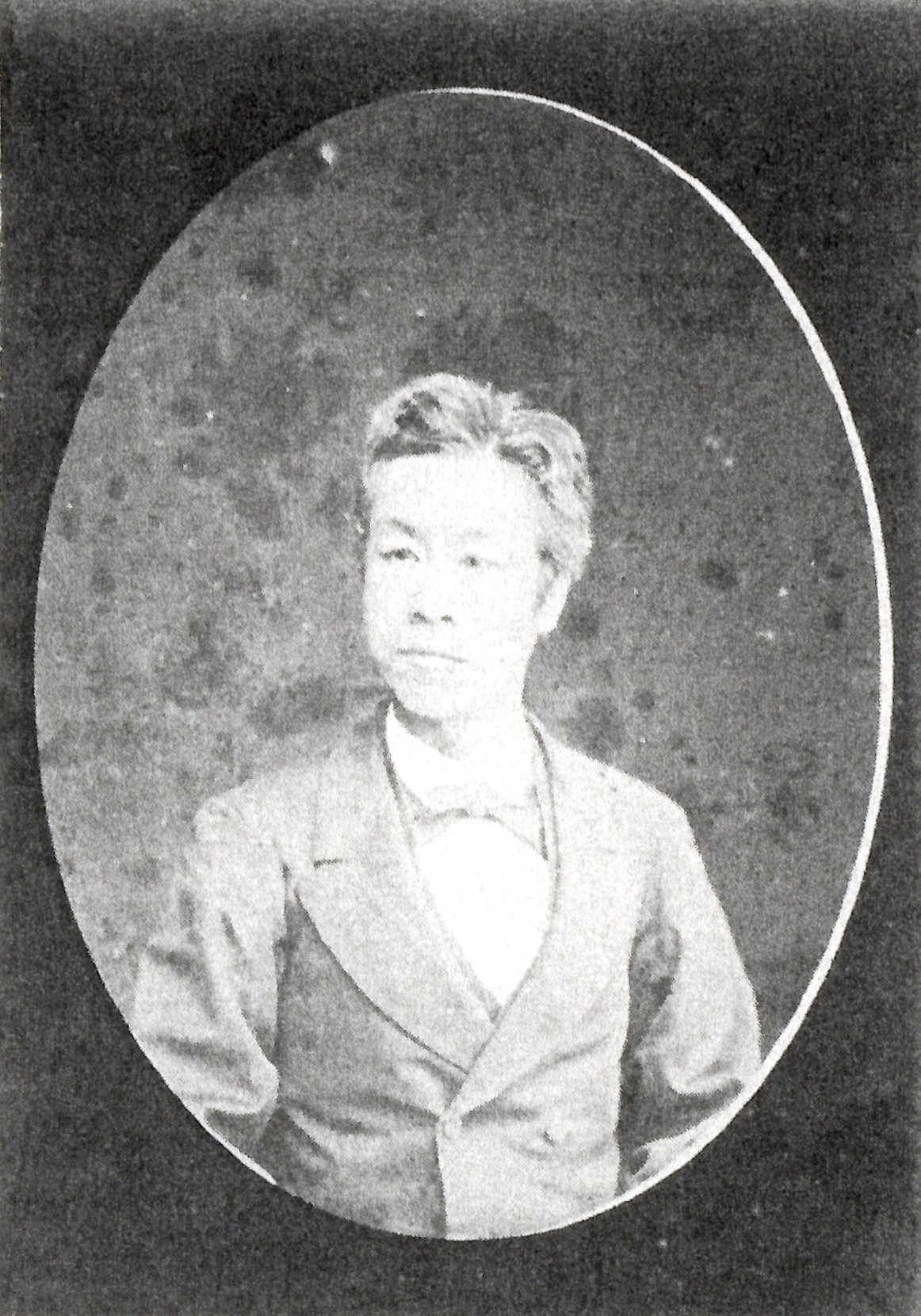 酒井忠道伯爵の肖像写真。